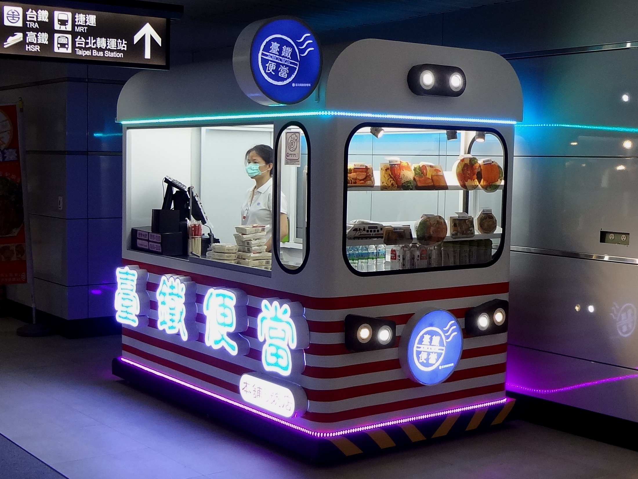 中文（台灣）: 臺鐵便當本舖5號店，位於臺北車站地下1樓，2017年3月31日開幕，臺灣鐵路管理局EMU1200型電聯車造型。